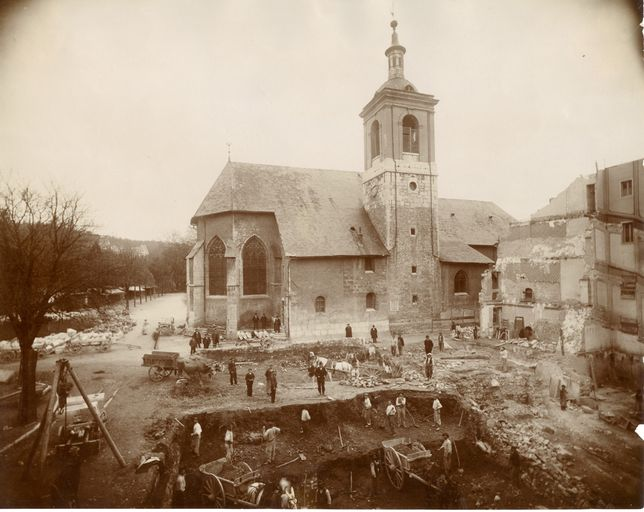 Fondation de l'hôtel Astoria, collégiale Notre Dame d'Aix